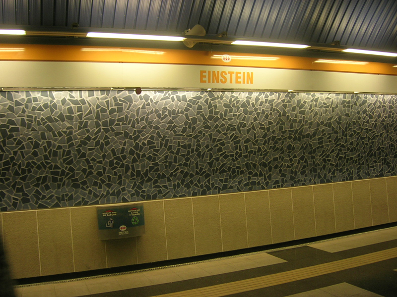 Nivel andén Estación Einstein